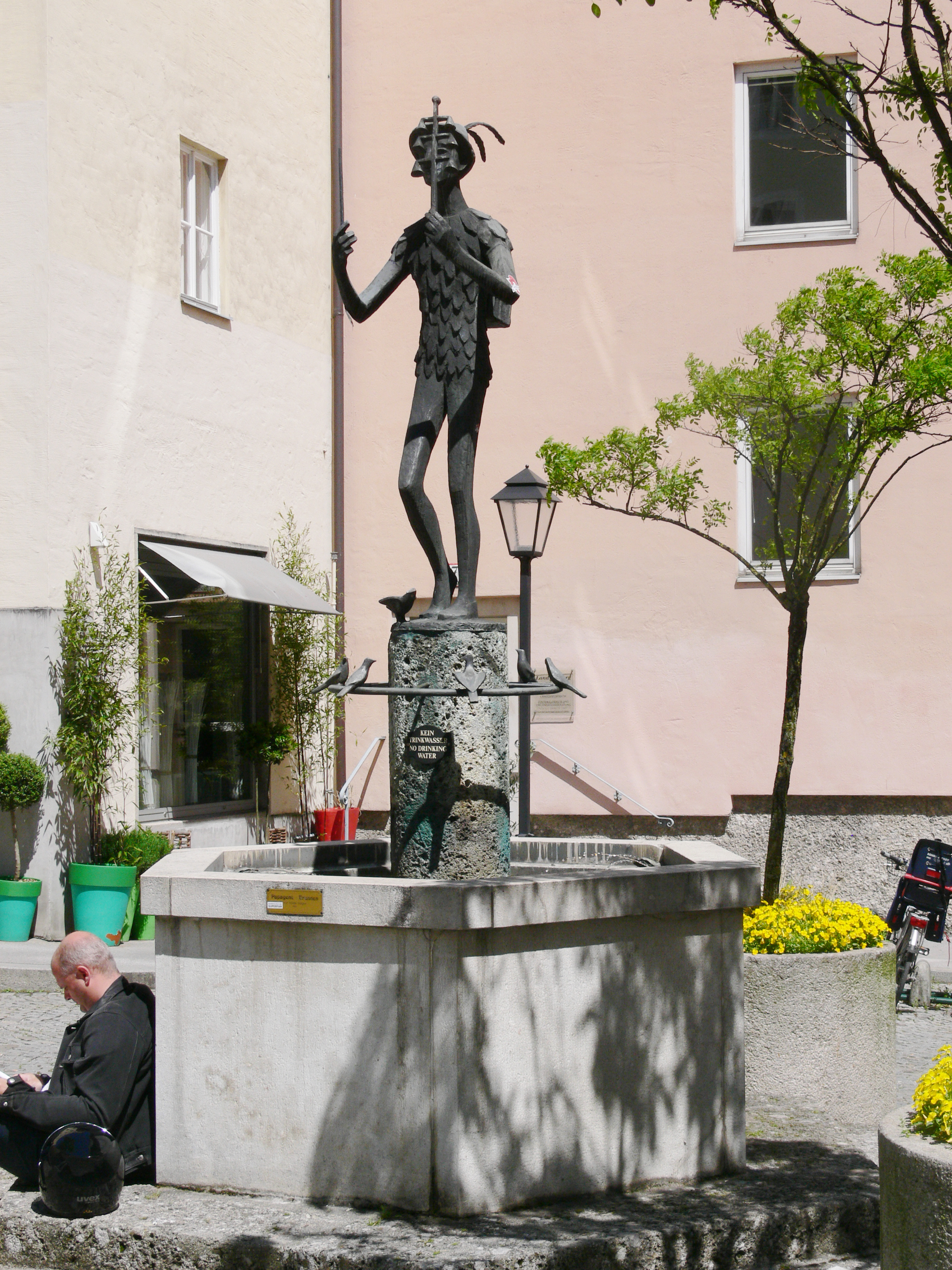 Papagenobrunnen am Papagenoplatz in Salzburg (Kaiviertel)